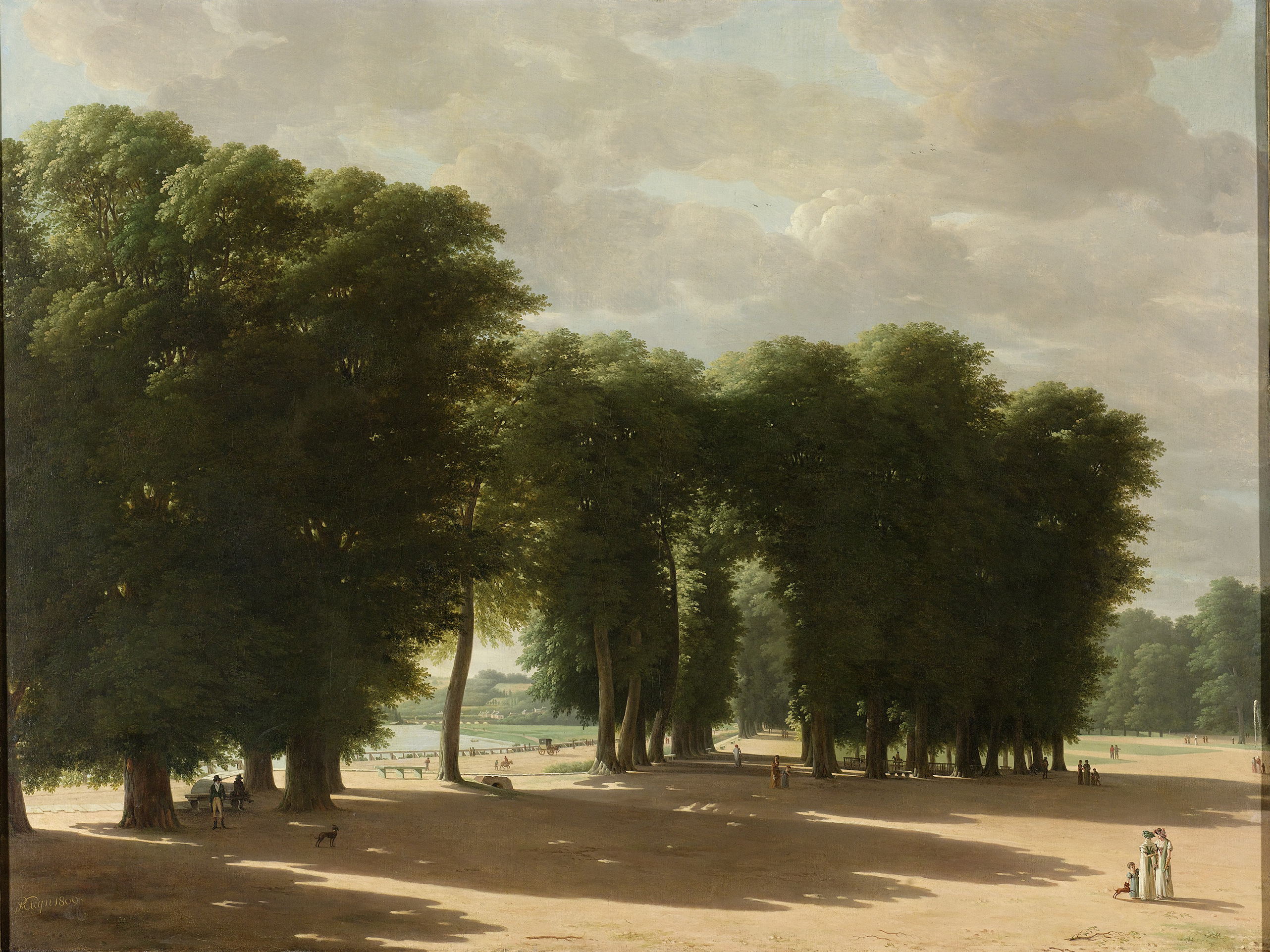 De ingang van het park St. Cloud te Parijs. Landschap met flanerende wandelaars, in de verte de Pont de Sèvres over de Seine.; Pieter Rudolph Kleijn (1785-1816), Parijs, 1809, olieverf op doek